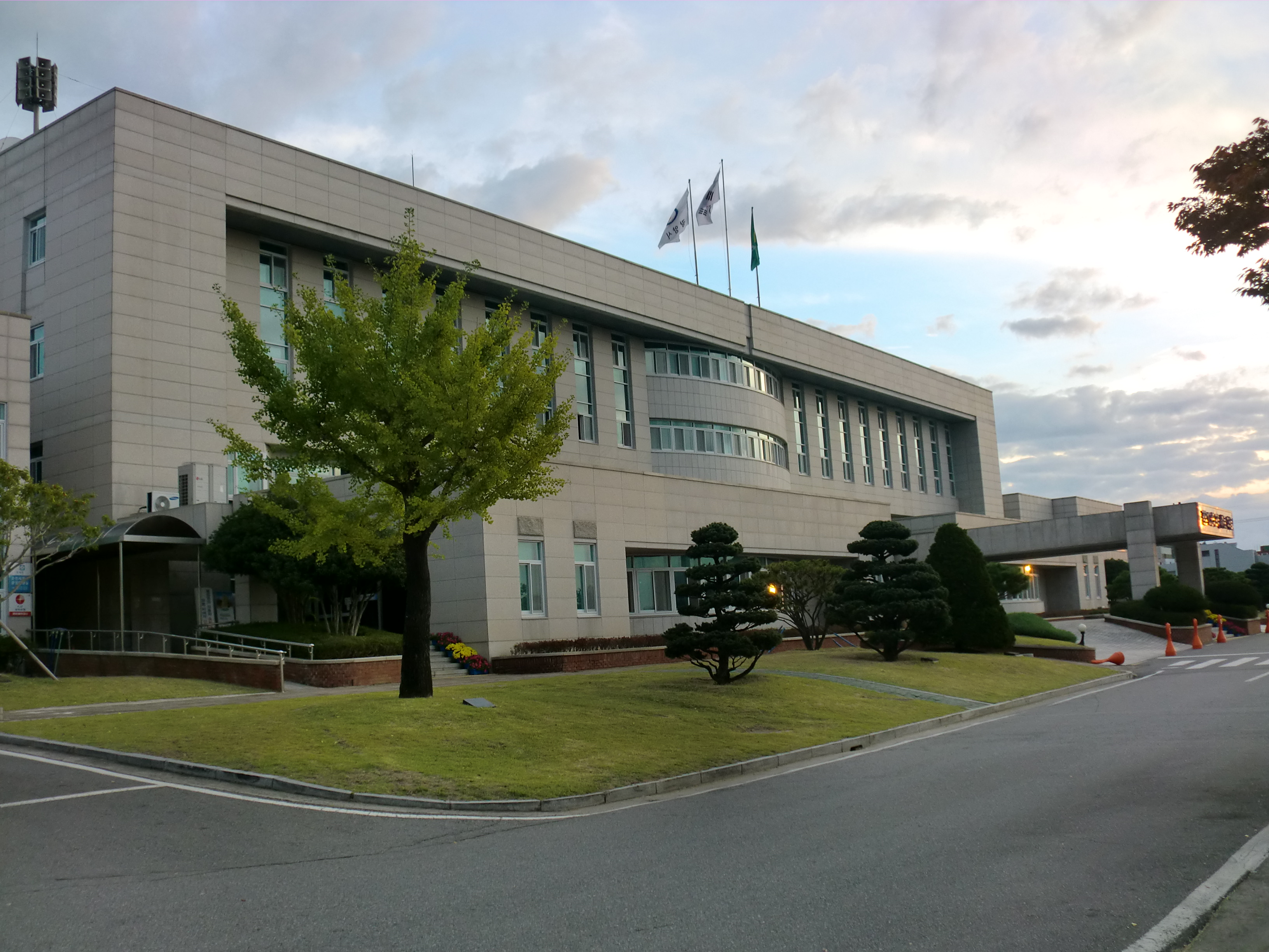 전라남도 광양시에 있는 광양시청